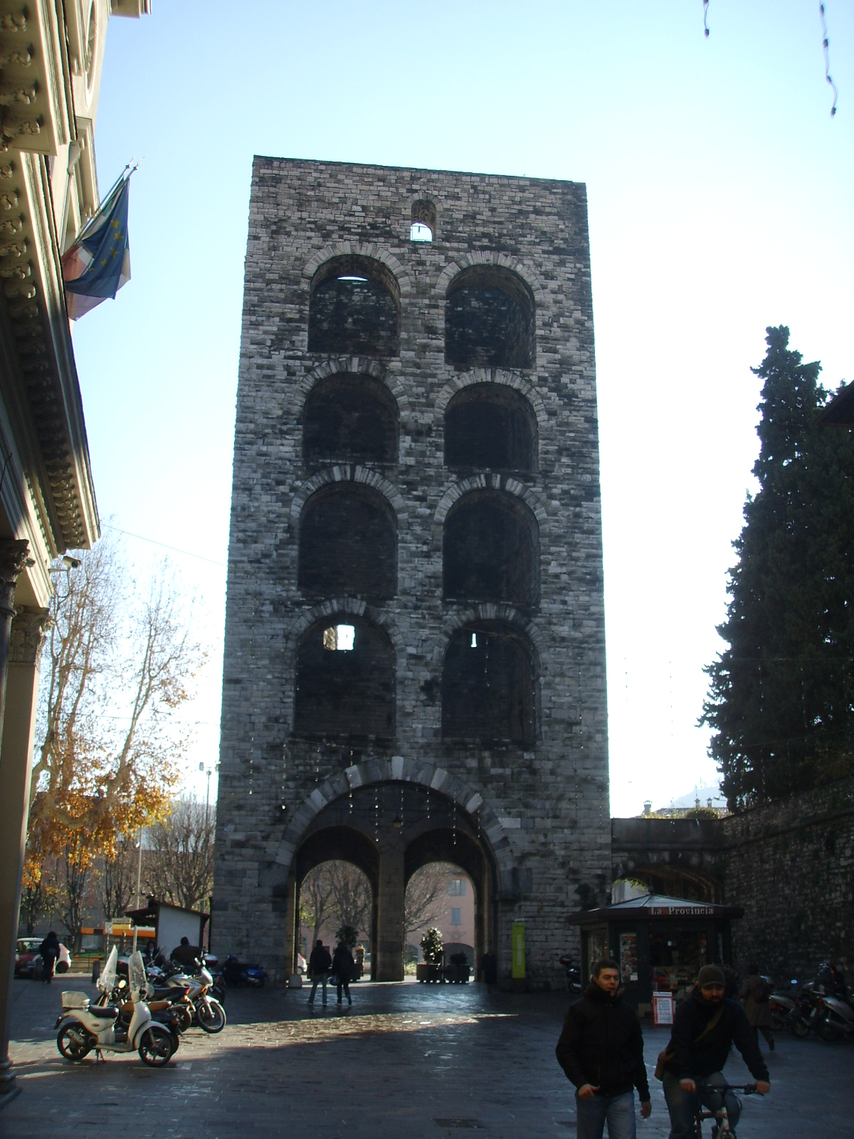 Como, torre medievale piazza vittoria